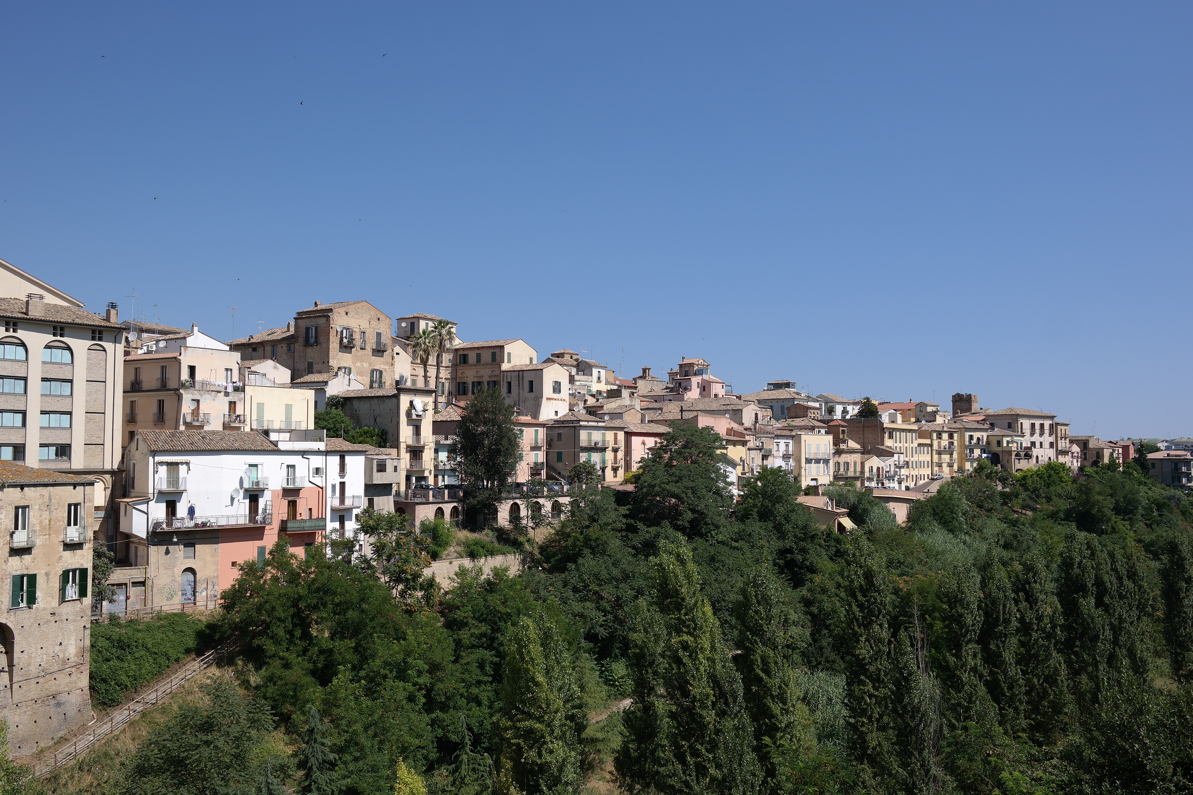 Quartiere di Lancianovecchia nel centro storico di Lanciano